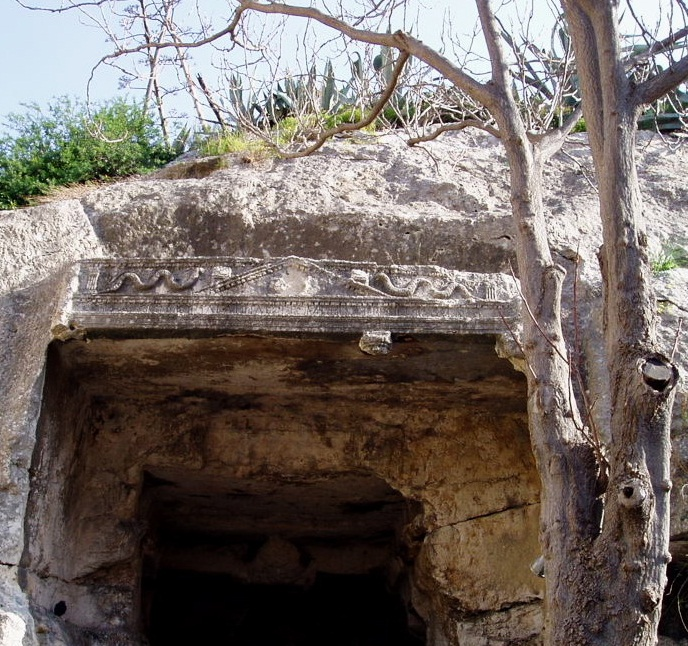 Sepolcro della nobile romana Aptilia Pomptilla